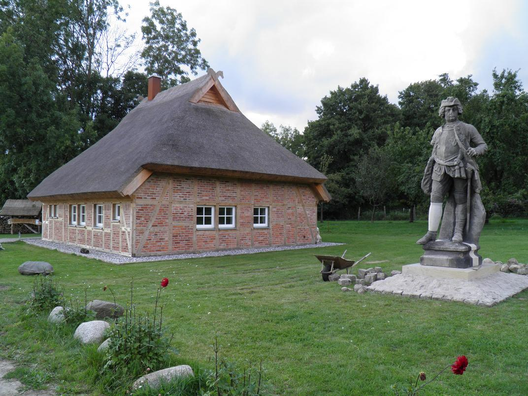 Verräterhaus und Originalstatue Friedrich Wilhelm I. Gross Stresow